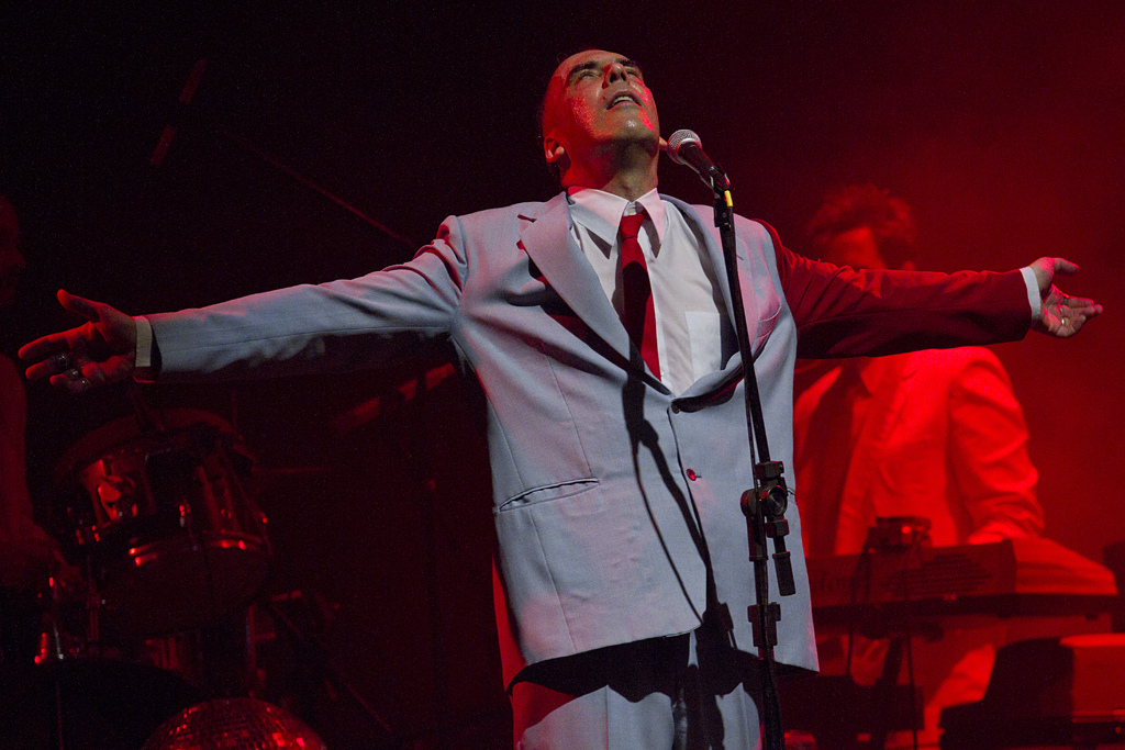 Arnaldo Antunes apresentando no Circo Voador no Rio de Janeiro em 2011.